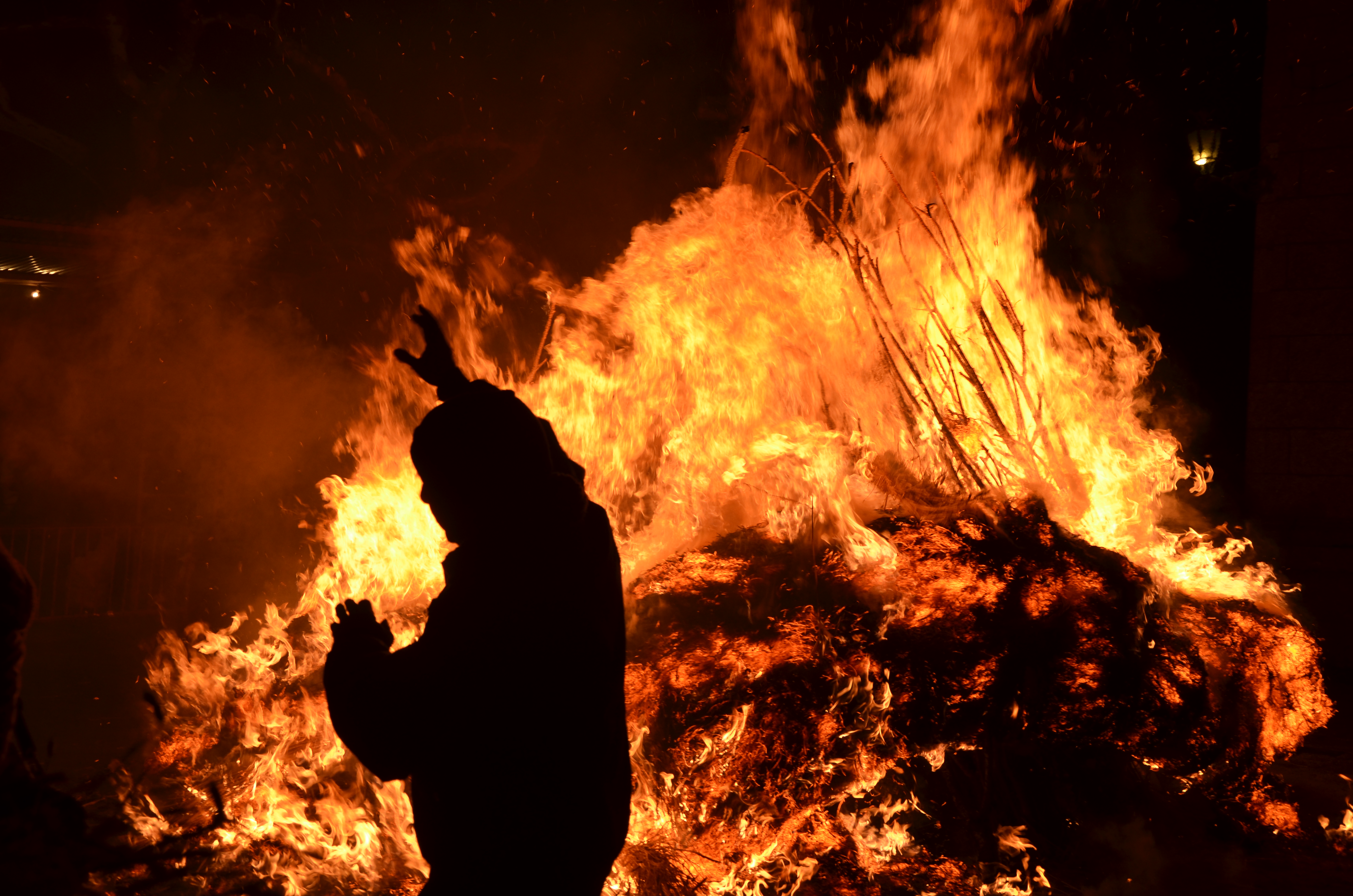 Festa dos Fachós en Castro Caldelas.